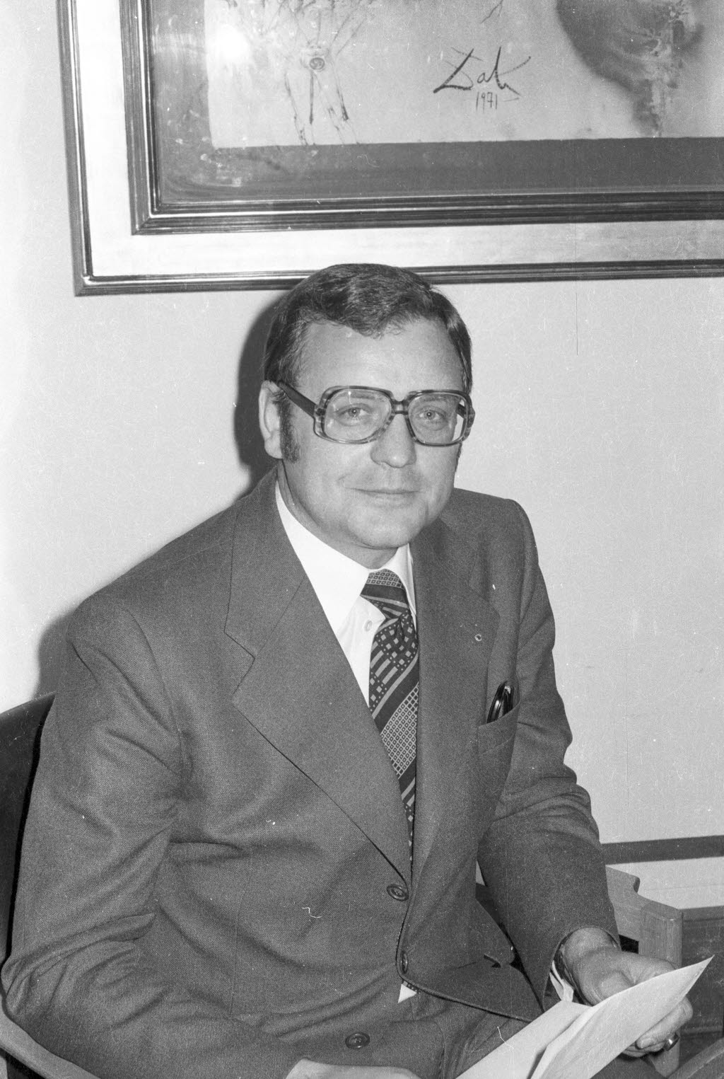 wurde in der Ratsversammlung als neuer Wirtschaftsdezernent vereidigt.